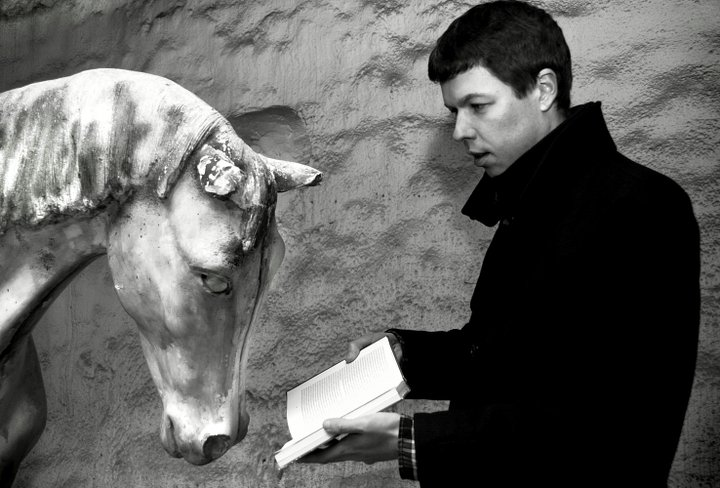 Dramatik Pavel Trtílek v divadle Husa na provázku